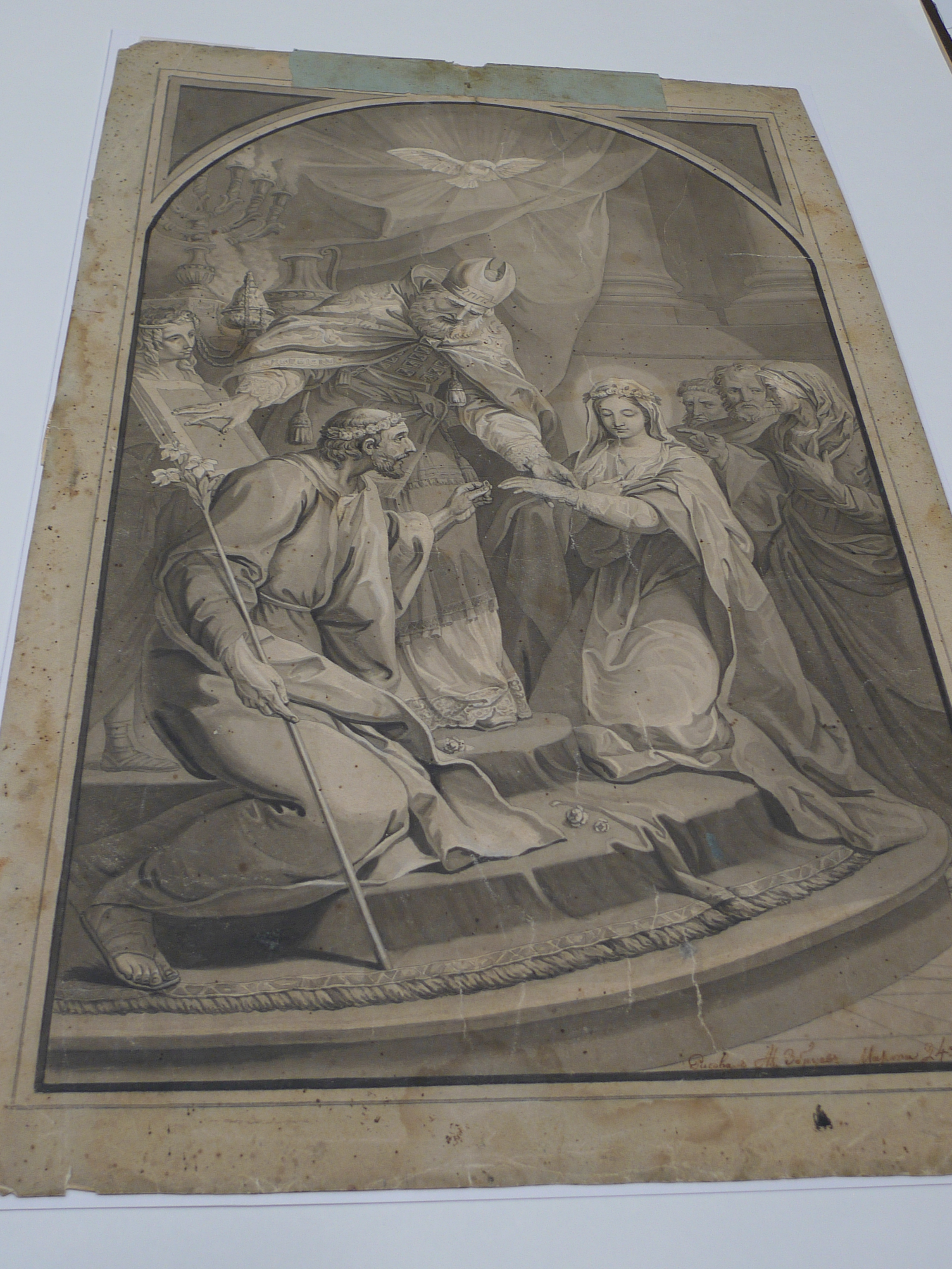 Художник А.А. Збруев, 1820 г. Государственная Третьяковская галерея.